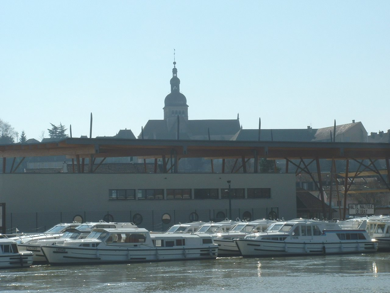 tourisme fluvial sur la Saône (halte nautique de Gray)